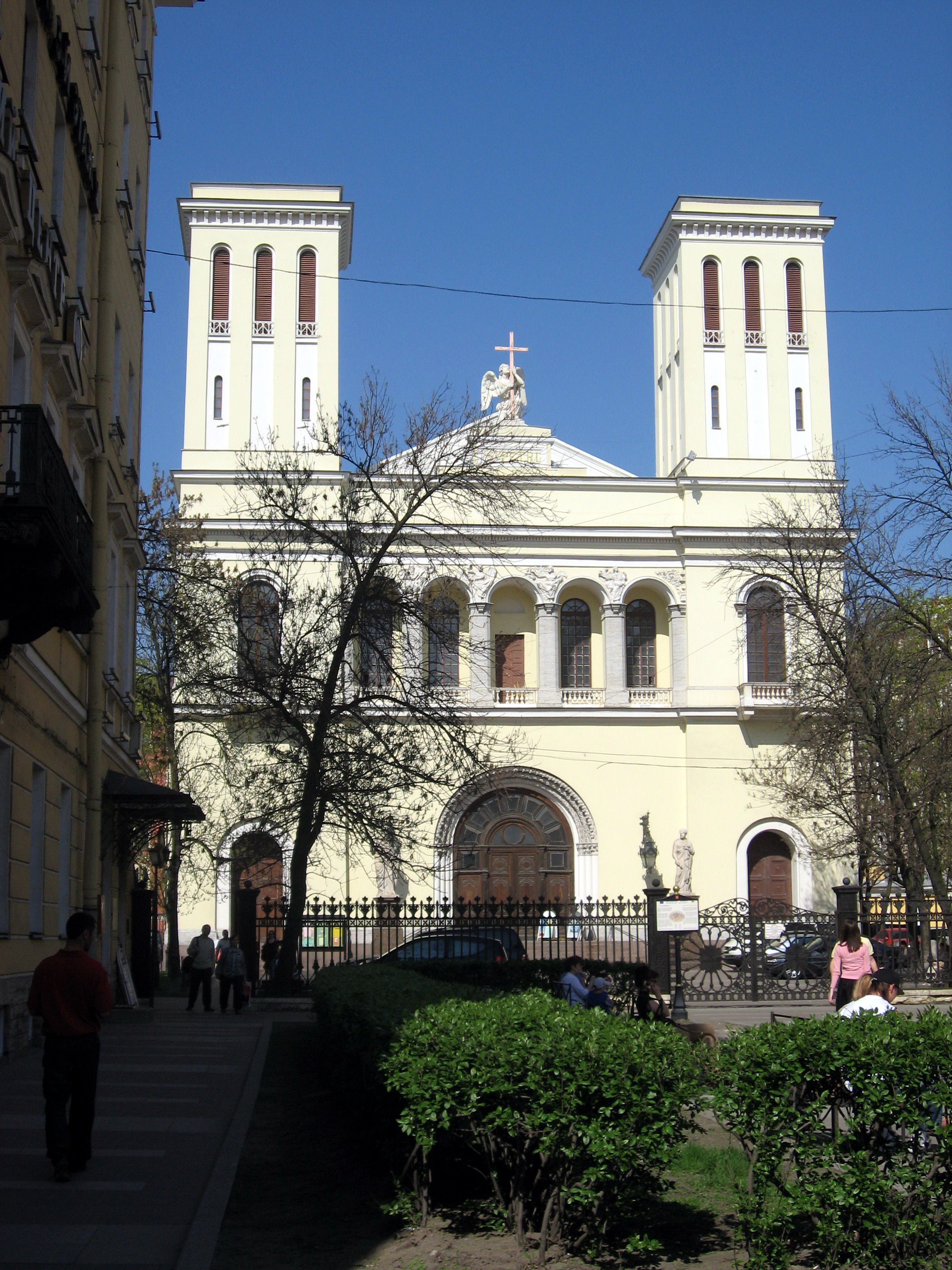 Sankt-Petěrburg (Petrohrad)